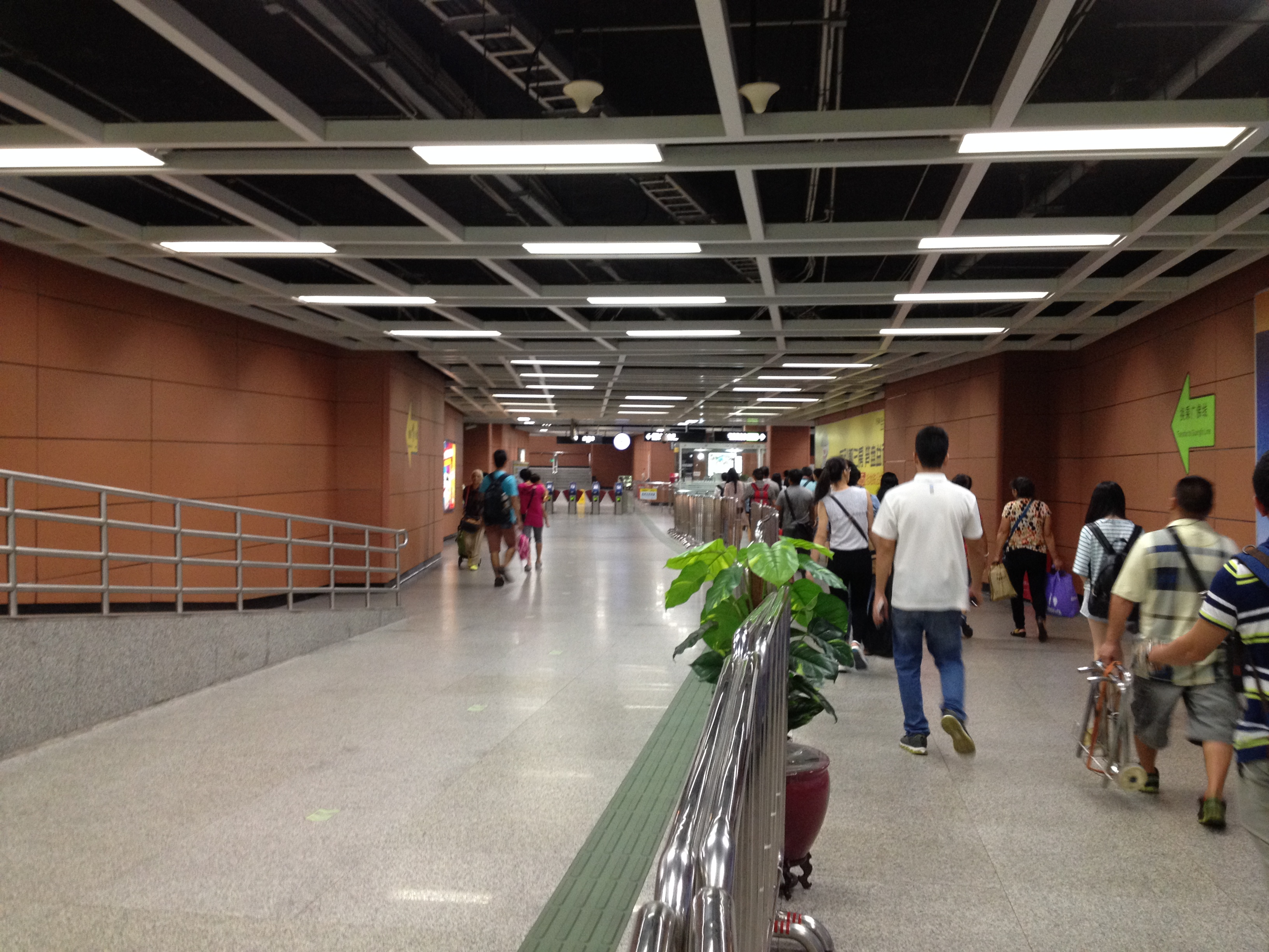 广州地铁西朗站换乘通道